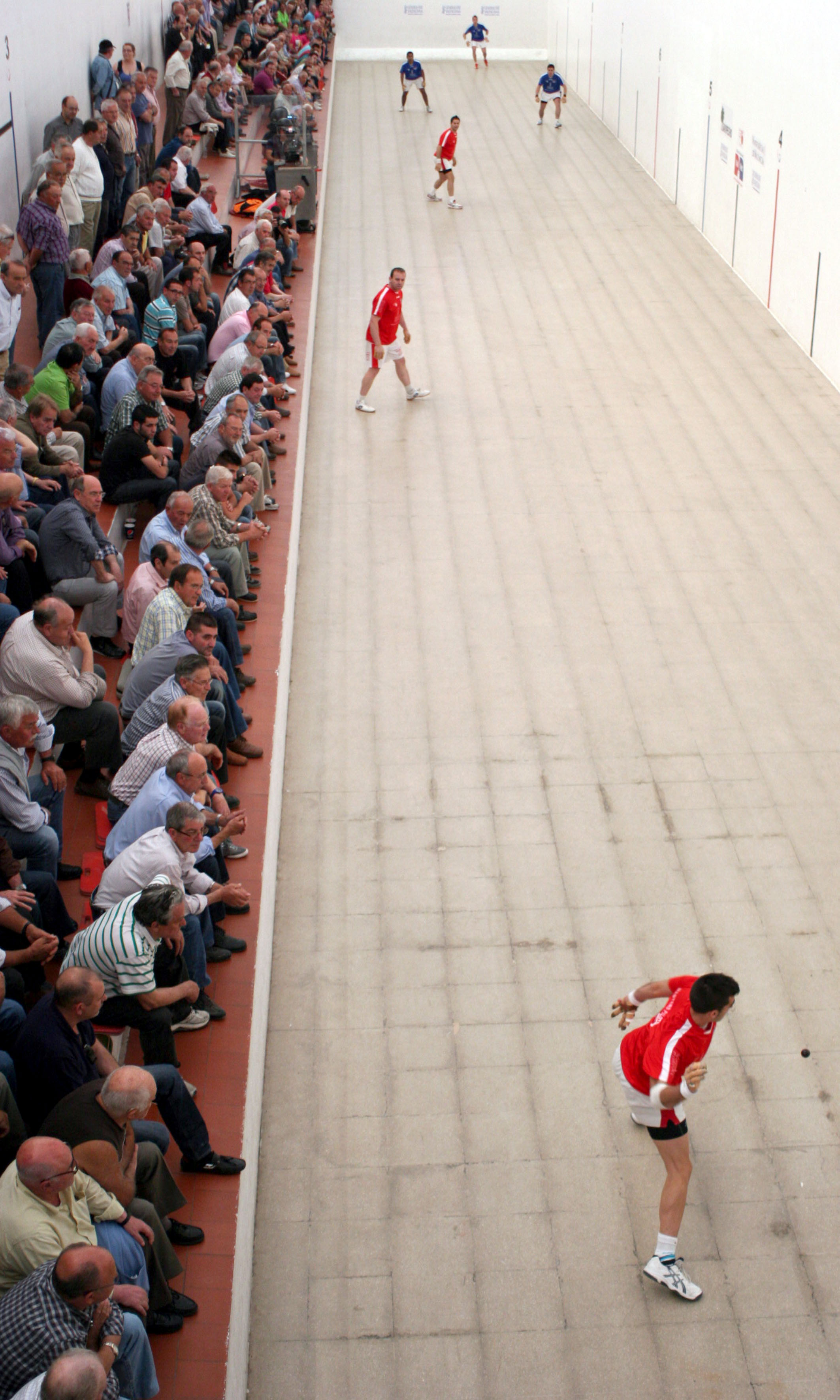 masters generalitat raspall4